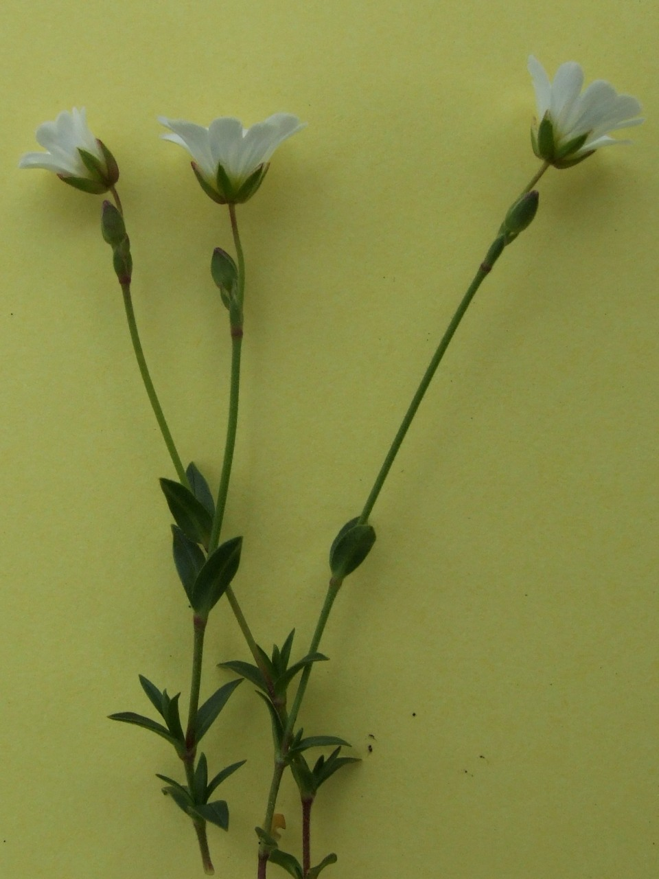 Cerastium tatrae